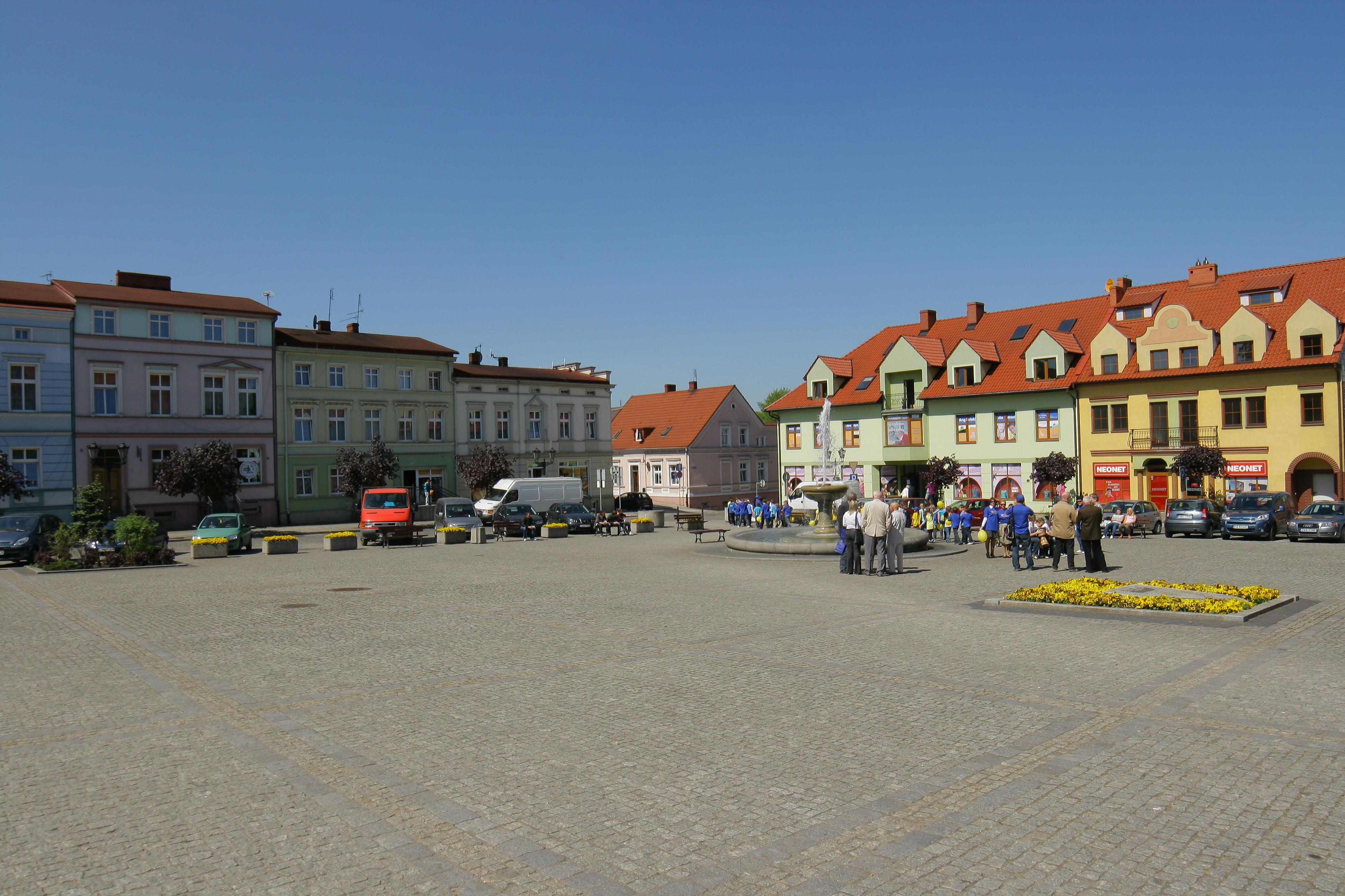 Wałcz, Poland